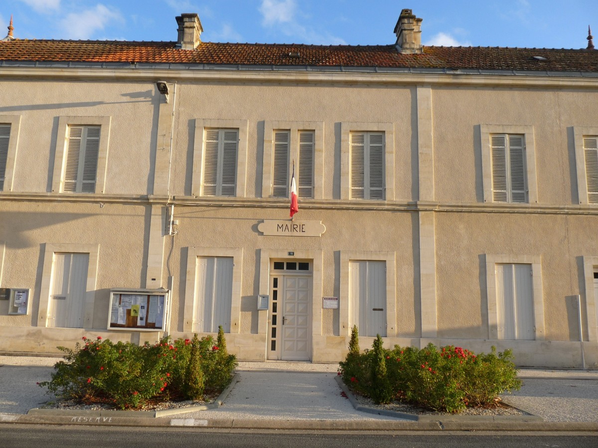 Mairie de Bedenac, Charente-Maritime, France